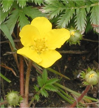 (Zilverschoon bloem) Potentilla anserina